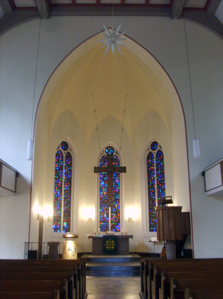 Inneres der Diakoniekirche, Wuppertal